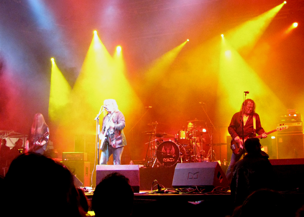 Y and T en concert au Raismesfest 2008